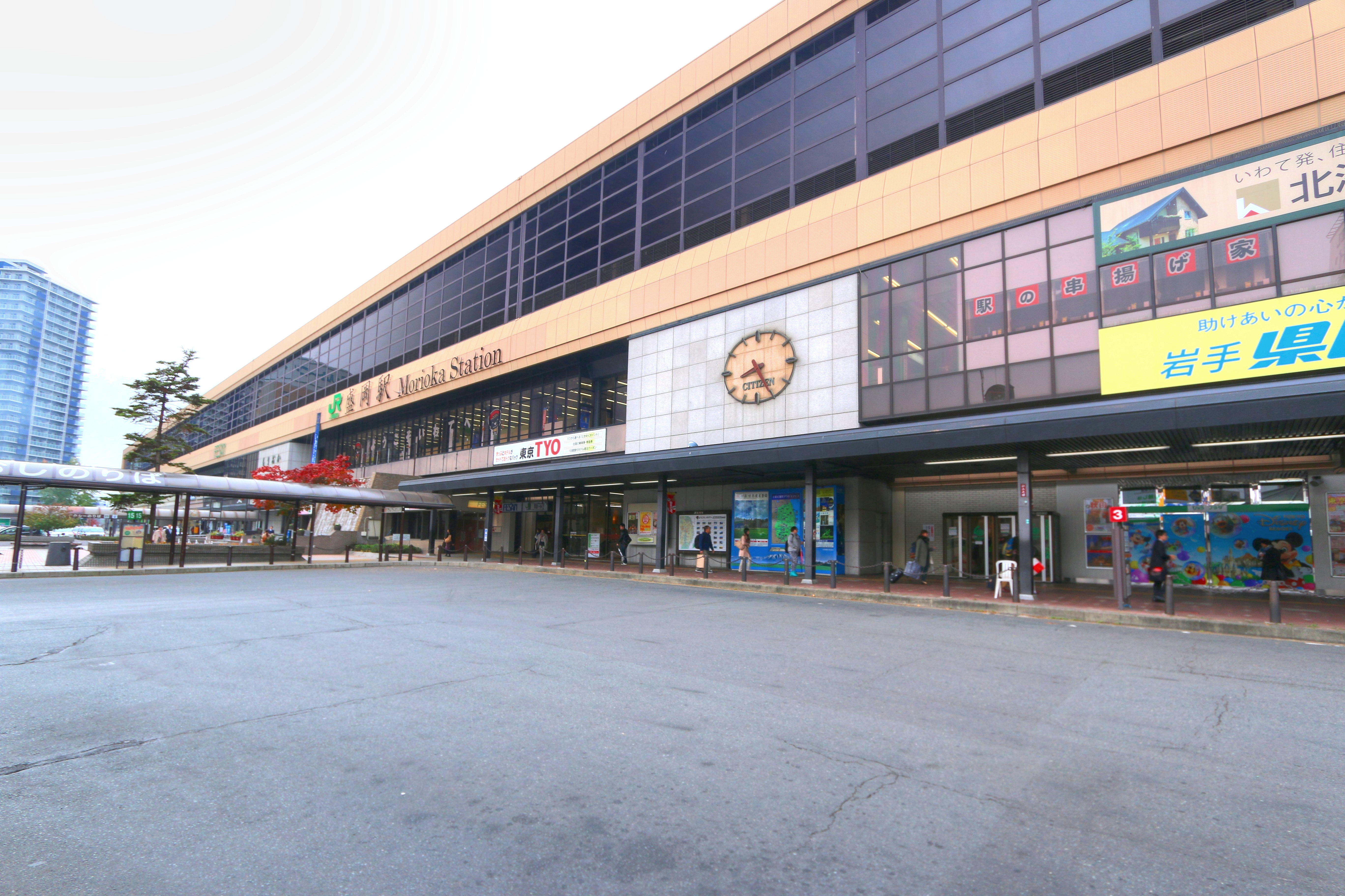 盛岡駅